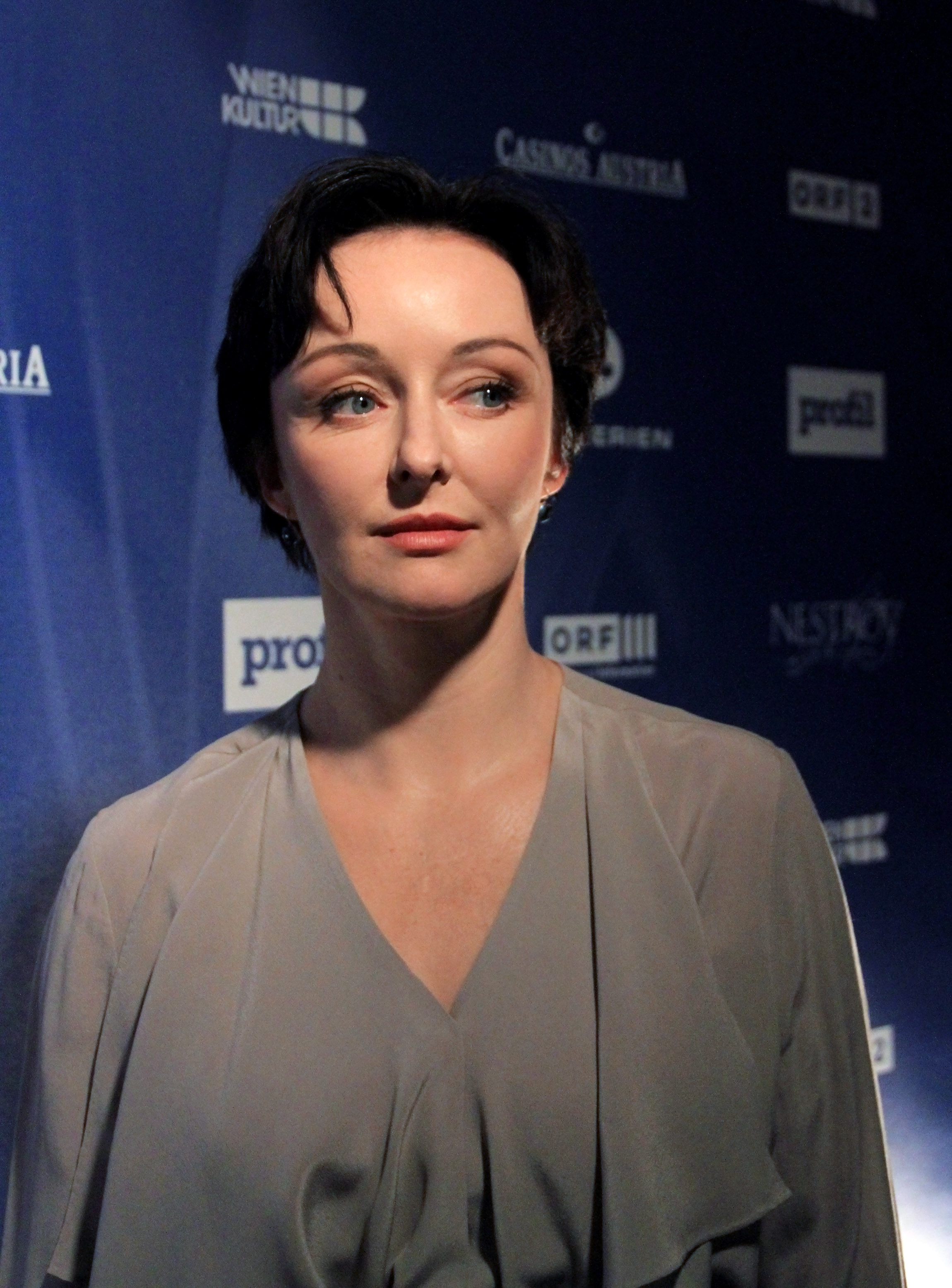 Regina Fritsch beim Nestroy-Theaterpreis 2012 im MuseumsQuartier in Wien.